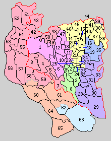 後の愛知県海部郡域の町村制時点の町村。